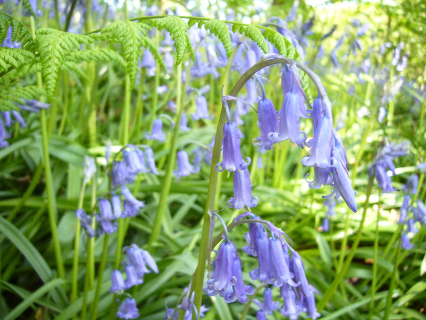 Bluebells